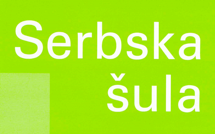 Logo der Zeitschrift Serbska sula